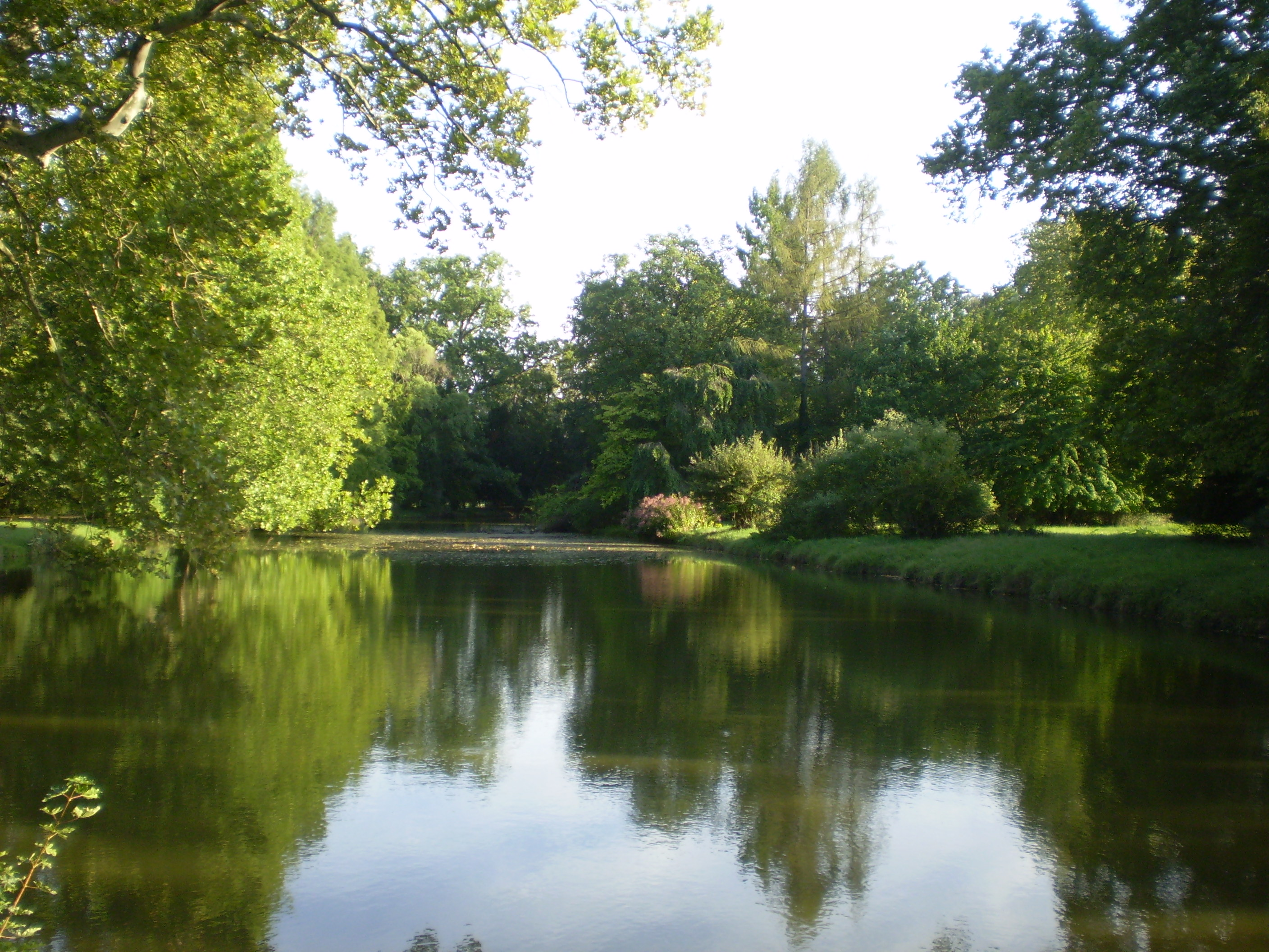 Areál Zámku Lednice.